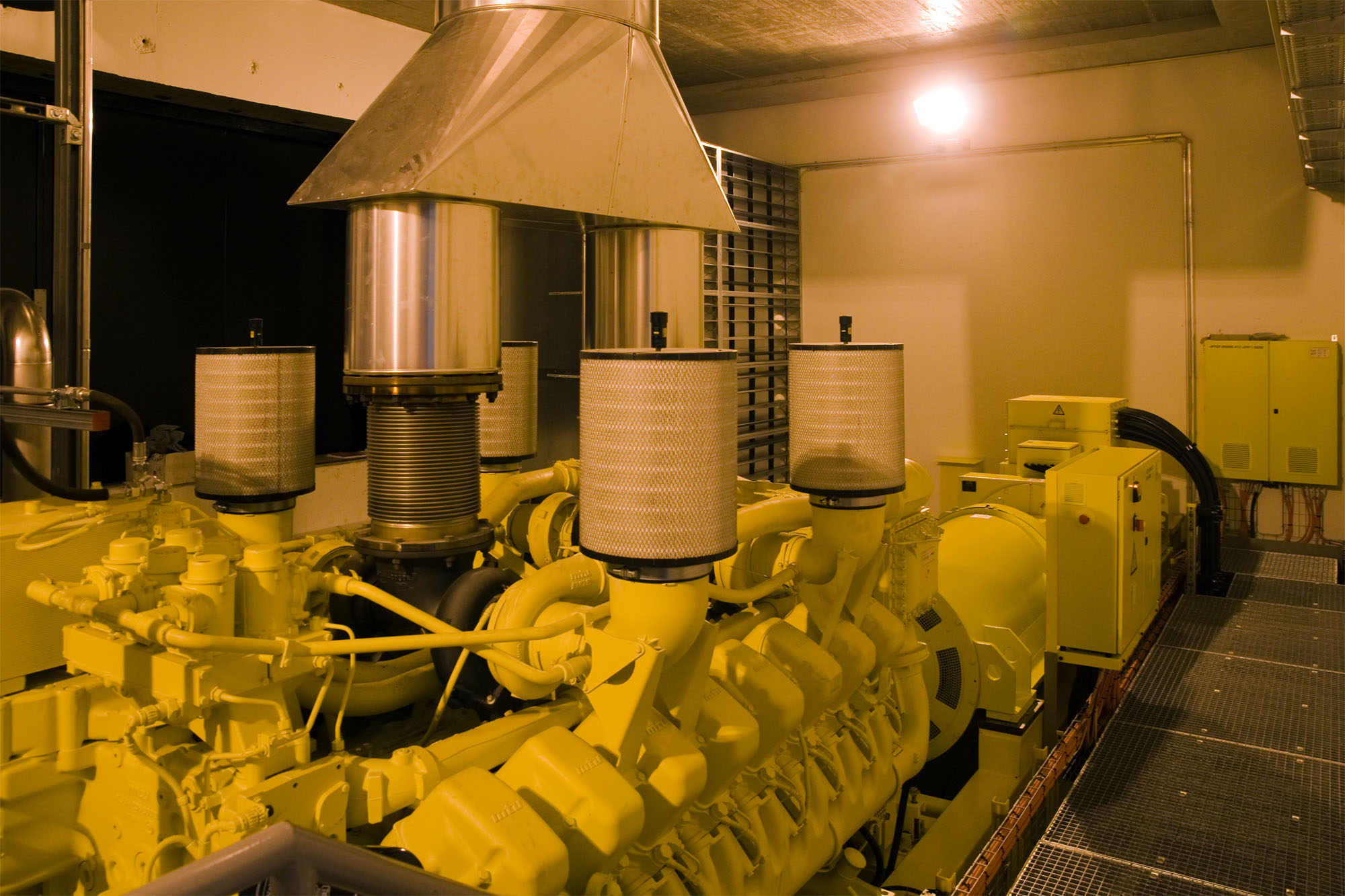 Notstromanlage (No Break-Anlage) in der Multifunktionsstelle Faido